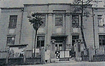 愛知県半田市の半田市立図書館。1946年の開館当時。